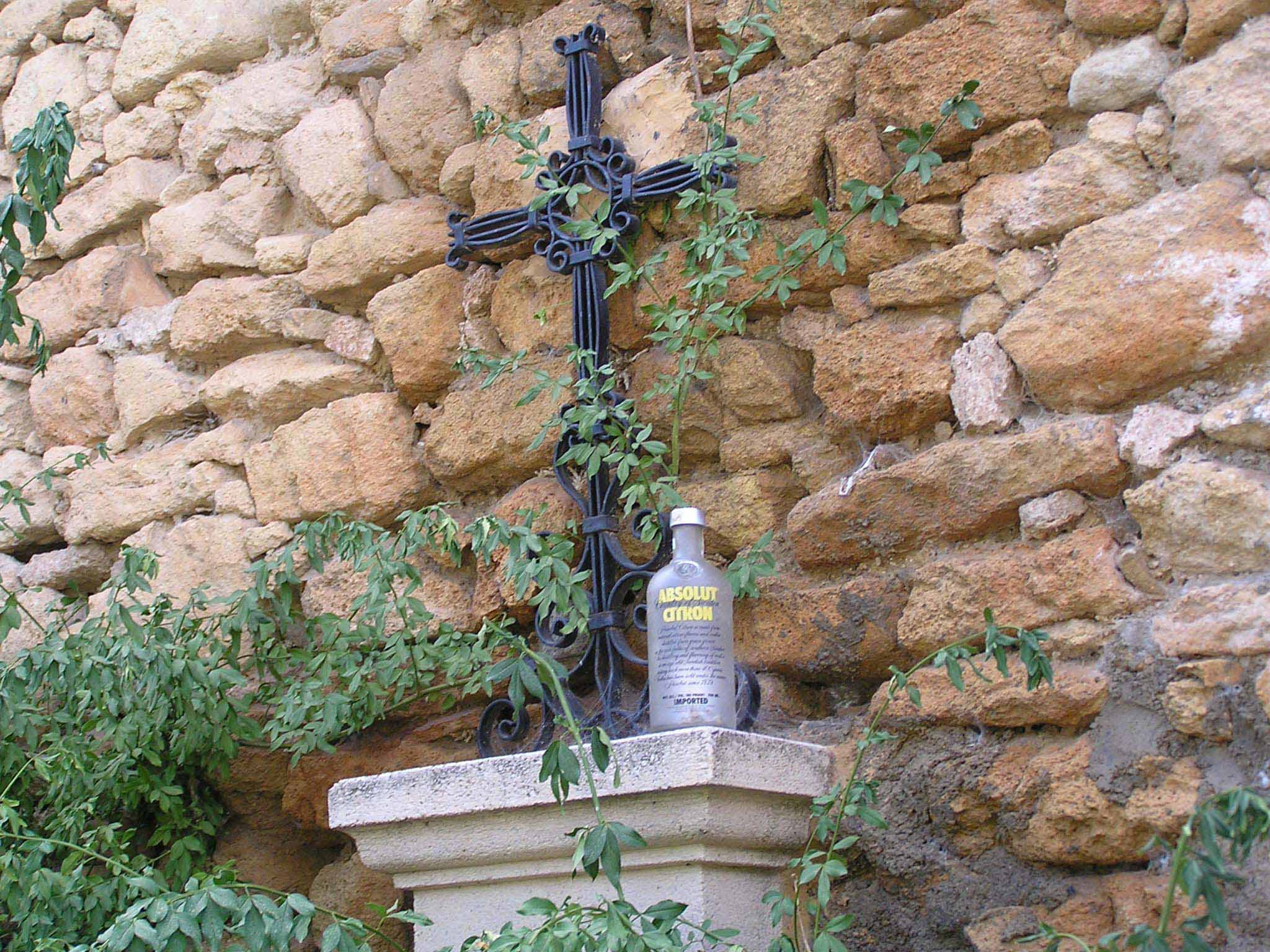 Una botella de vodka Absolut junto a una cruz, tras el botellón en Alcalá la Real, Jaén, España.